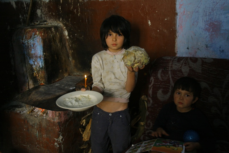 Doi copii, care traiesc in saracie.